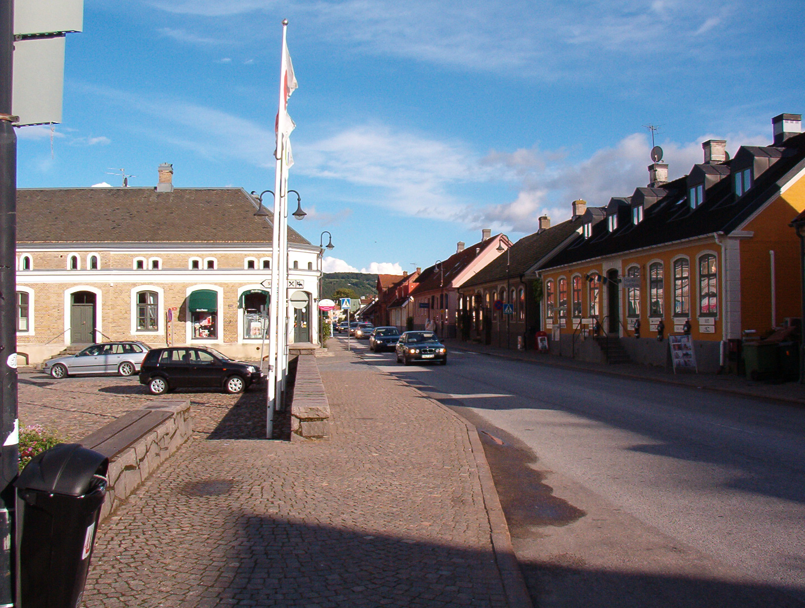 date august 2005